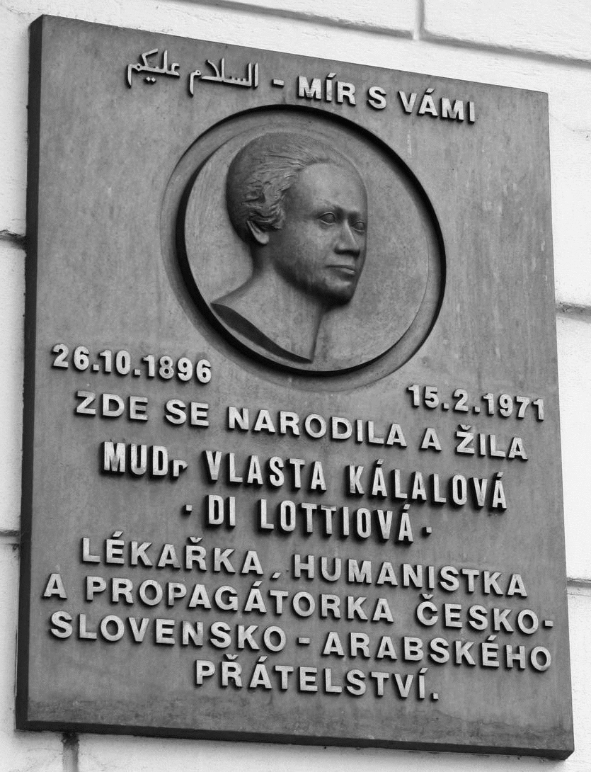 Pamětní deska na rodném domě MUDr. Vlasty Kálalové-Di Lotti v Bernarticích, ulice Táborská 5/21; 398 43 Bernartice – část obce Bernartice, okres Písek, Jihočeský kraj, Česko